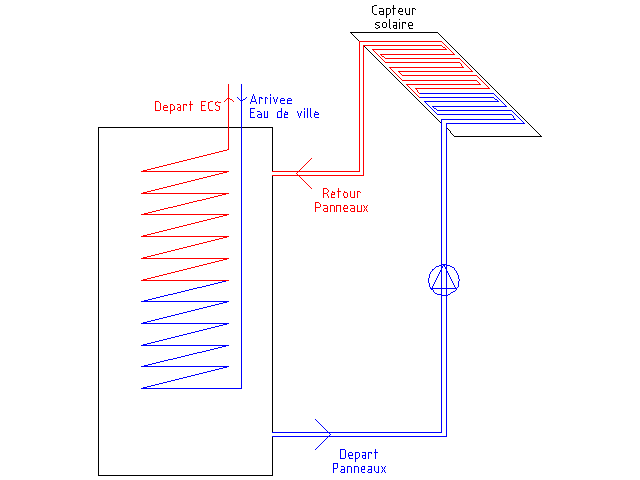 Schéma de principe d'un système solaire équipé d'un ballon de stockage, d'un capteur solaire et d'un échangeur tubulaire de chaleur côté Eau Chaude Sanitaire